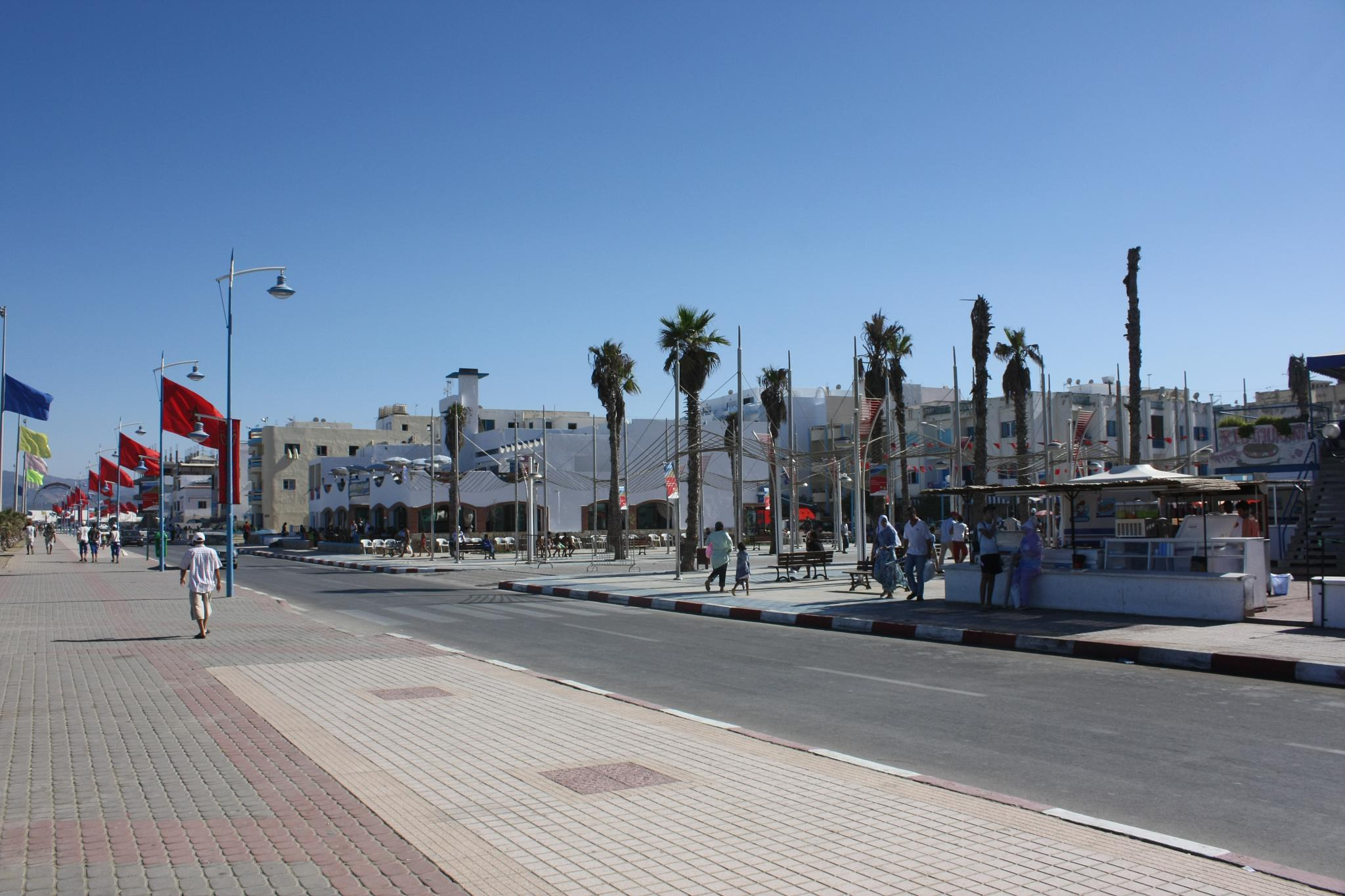 Martil